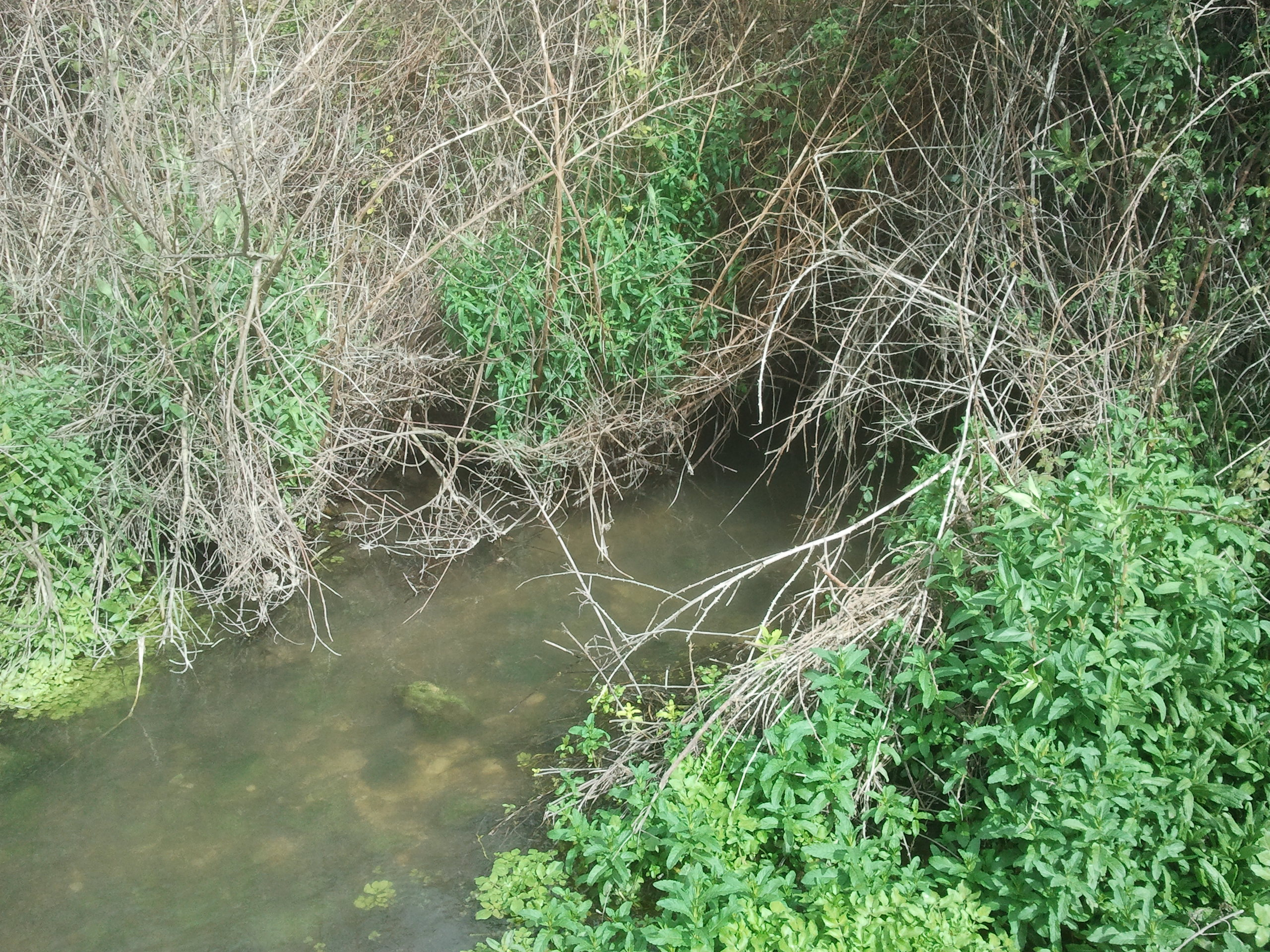 נחל תות מהווה גבול בין הר הכרמל ורמות מנשה. תחילתו ליד מחלף אליקים והוא נשפך לנחל דליה ליד בת שלמה